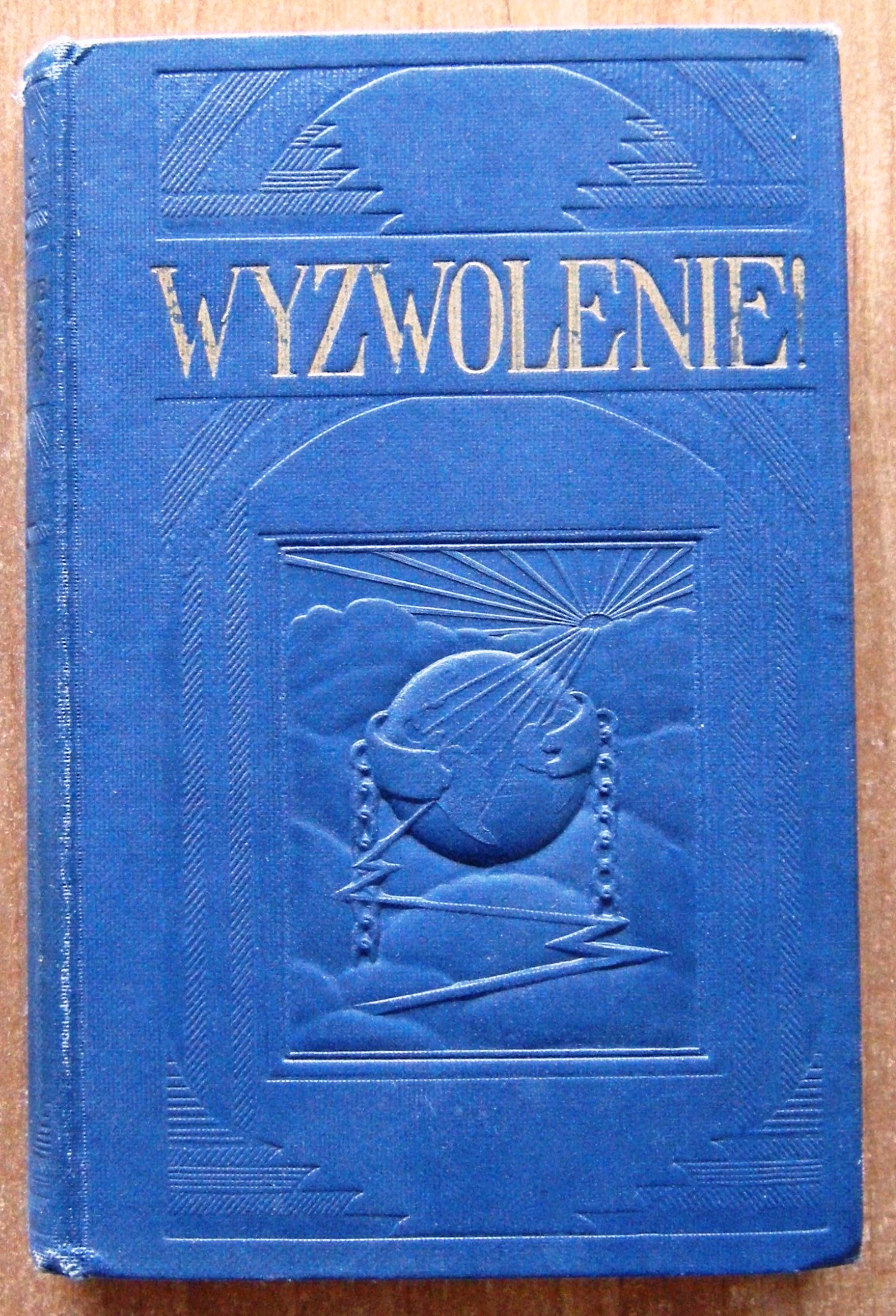 Książka "Wyzwolenie" wydana przez Świadków Jehowy w 1926 roku. Autor J.F. Rutherford. Zdjęcie okładki książki w języku polskim.